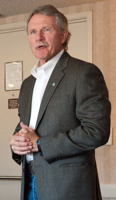 John Kitzhaber in 2010.